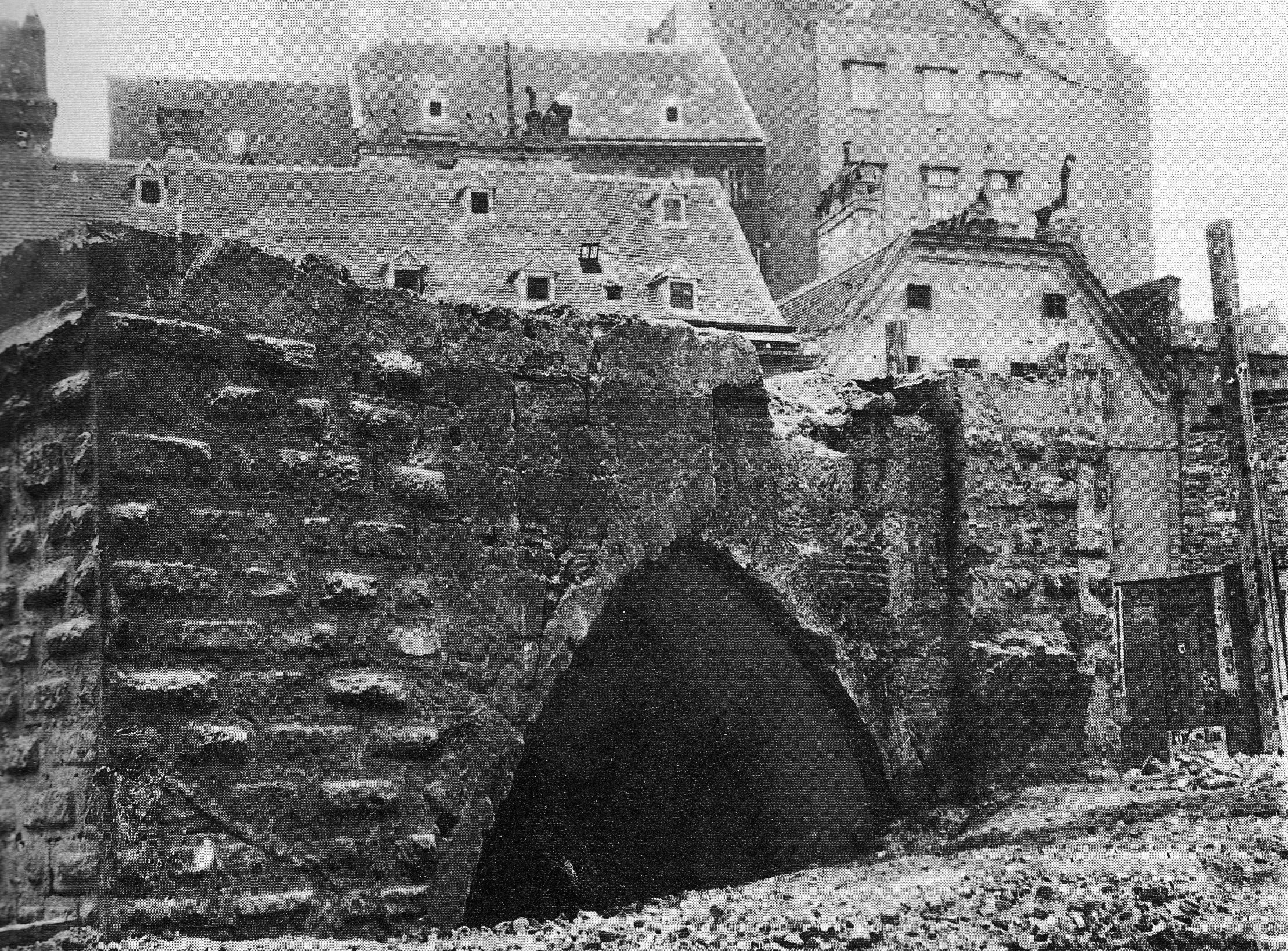 Der Abriss des Werdertors in Wien 1860